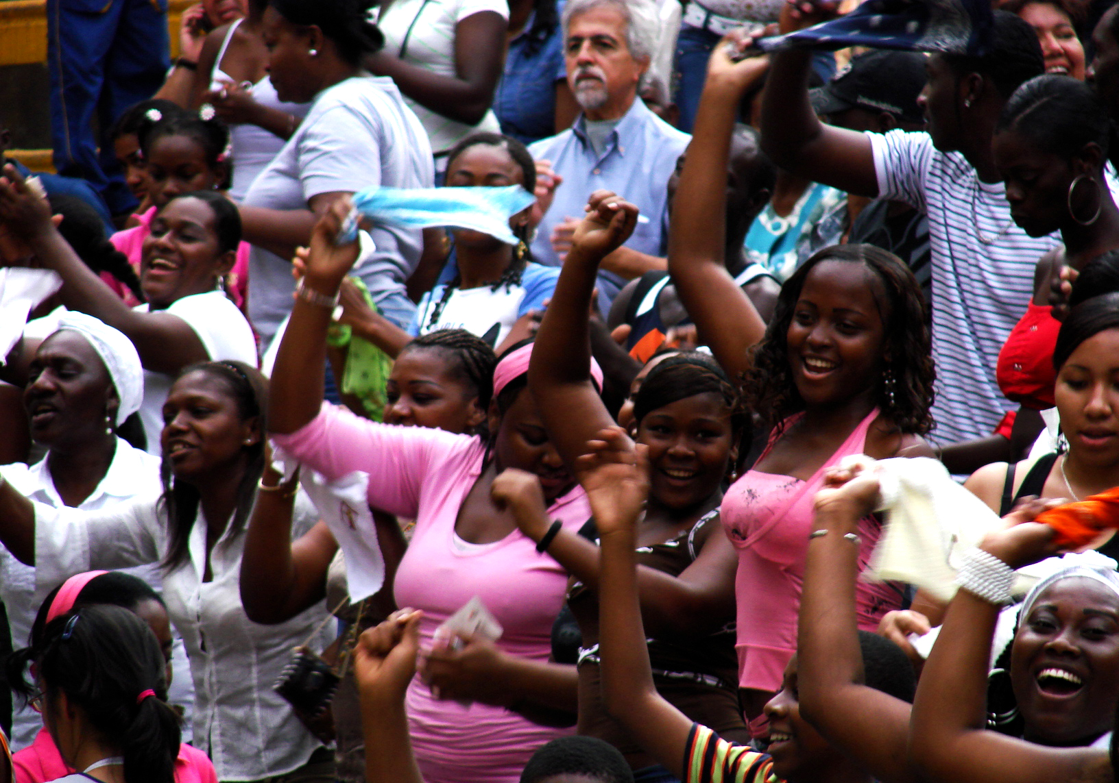 Público. Teatro al Aire libre Los Cristales.